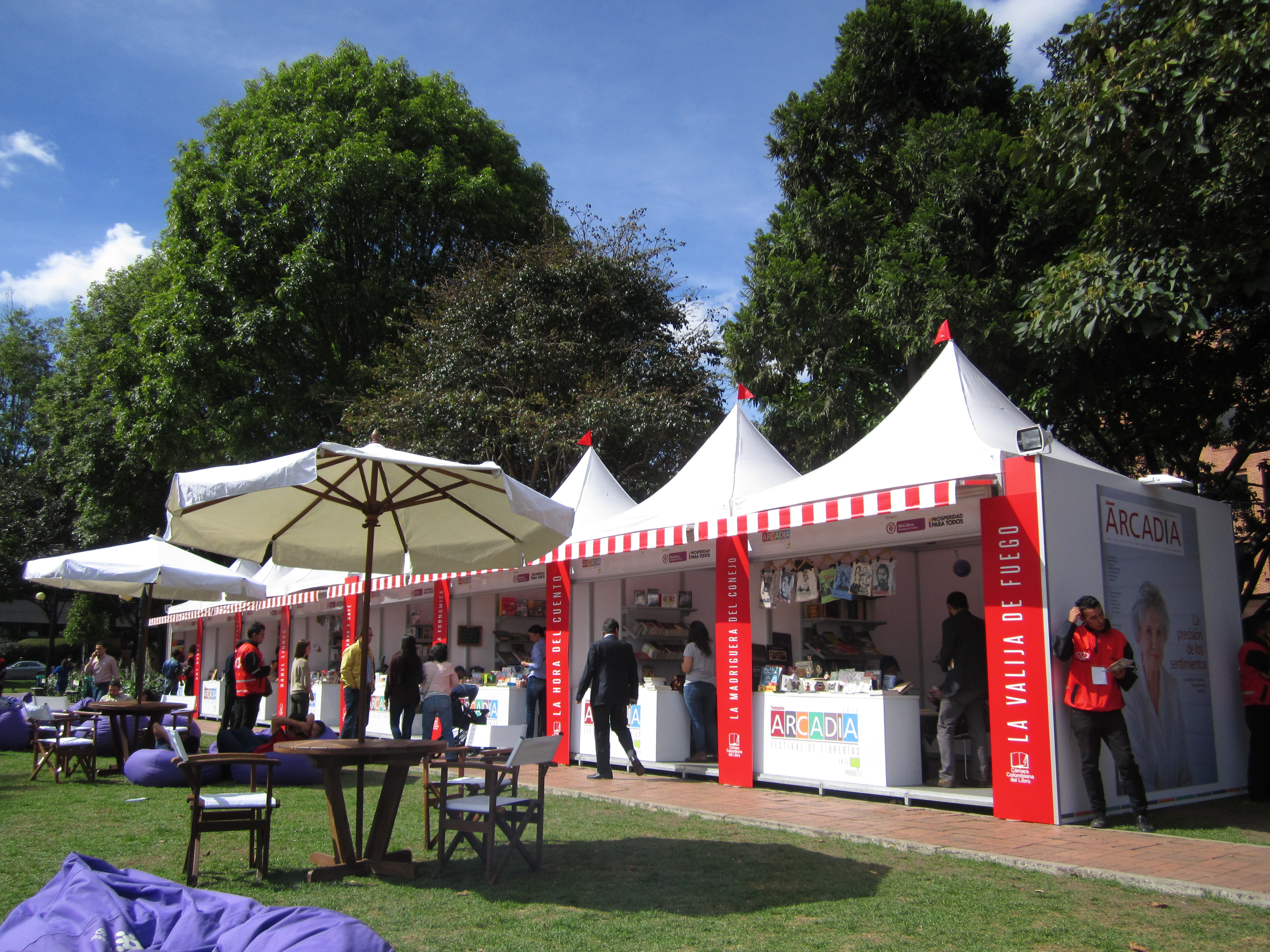 Bogotá parque calle 93, casetas del festival Arcadia